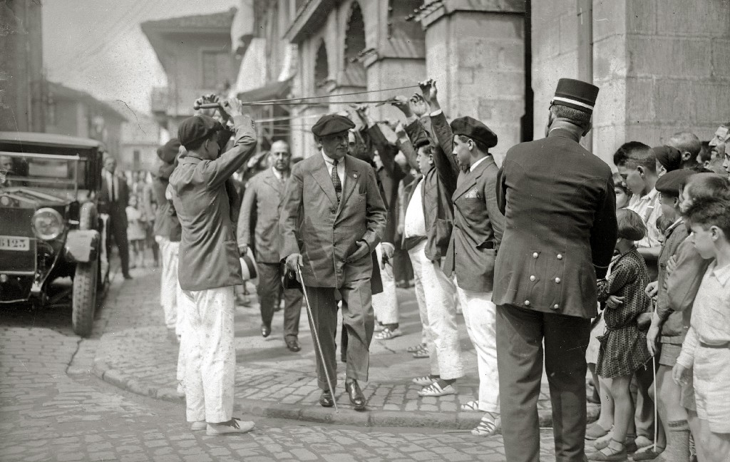 Título original: Visita del general Miguel Primo de Rivera a la localidad de Errenteria (6/6) Localización: Rentería (Guipúzcoa)